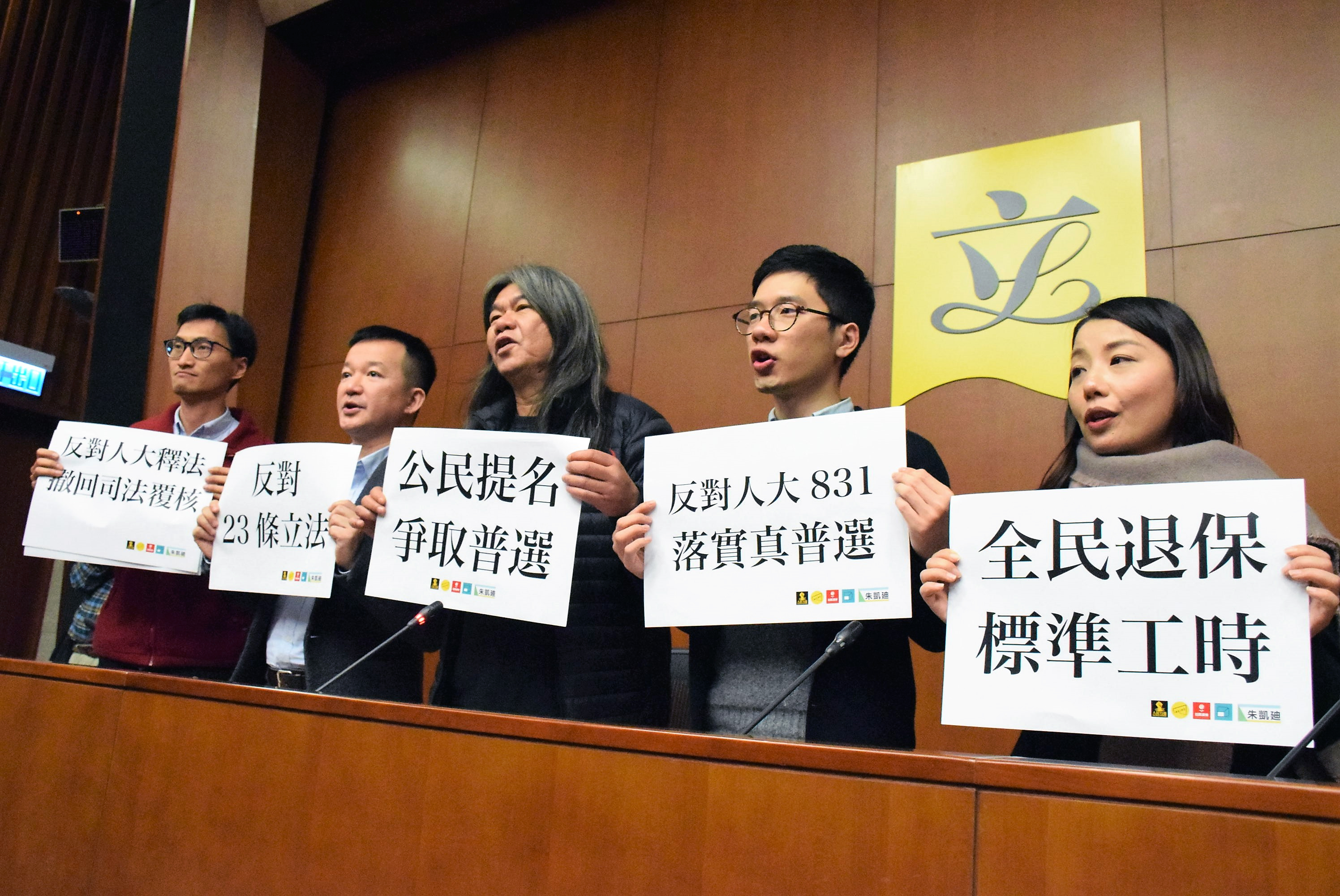 梁國雄宣布參選2017年香港行政長官選舉